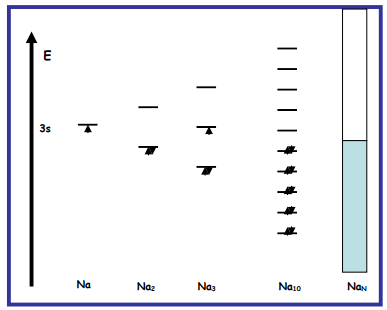 Sodioaren banda diagrama